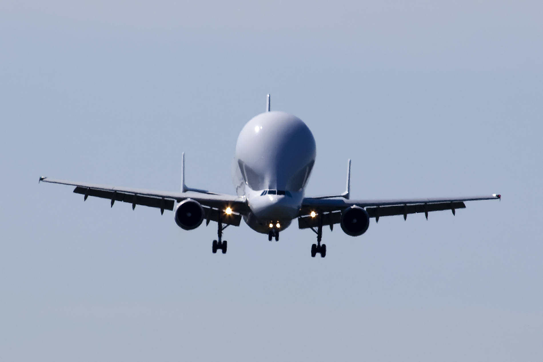 Hamburg-Finkenwerder